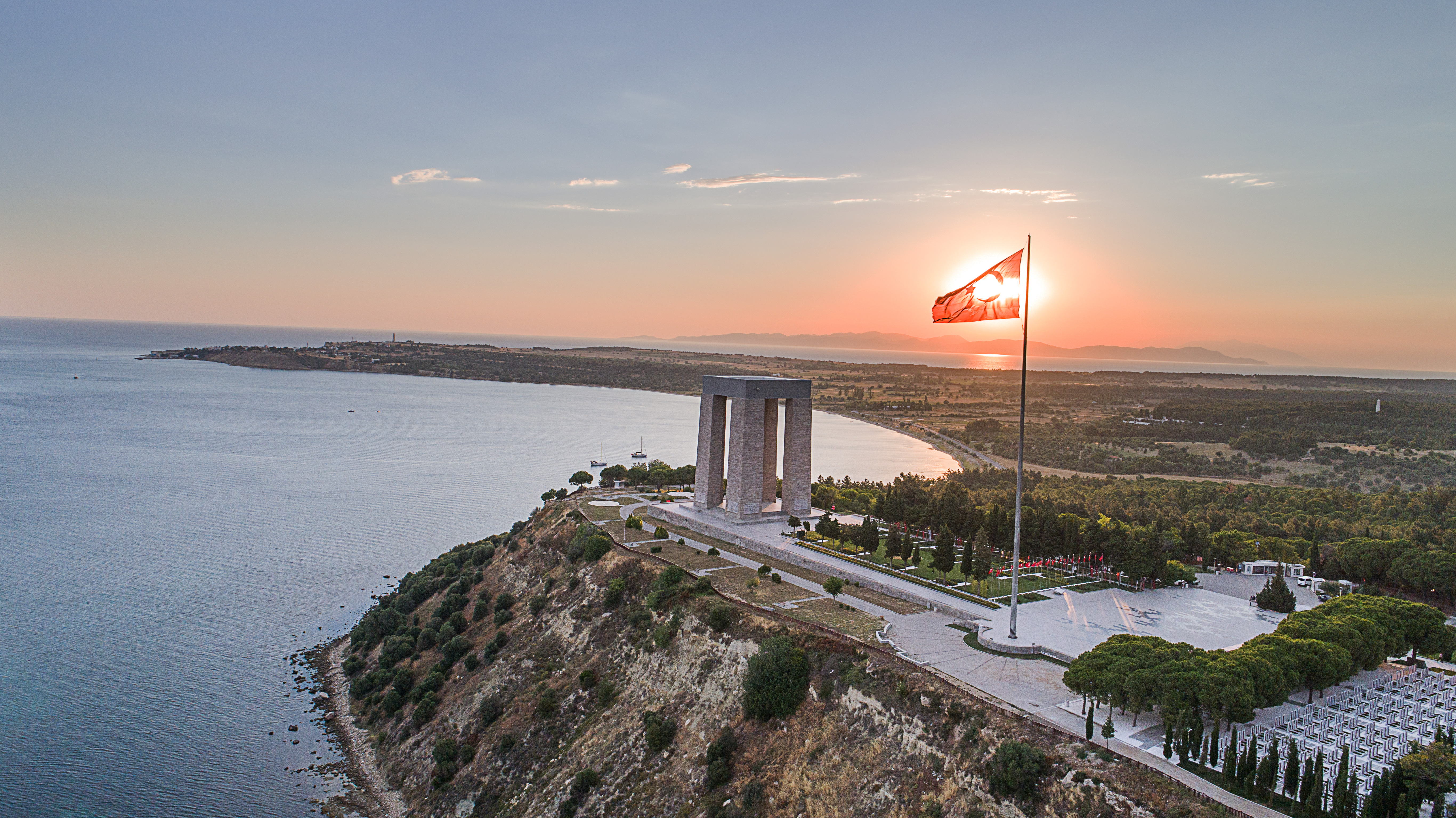 Çanakkale Şehitler Abidesi